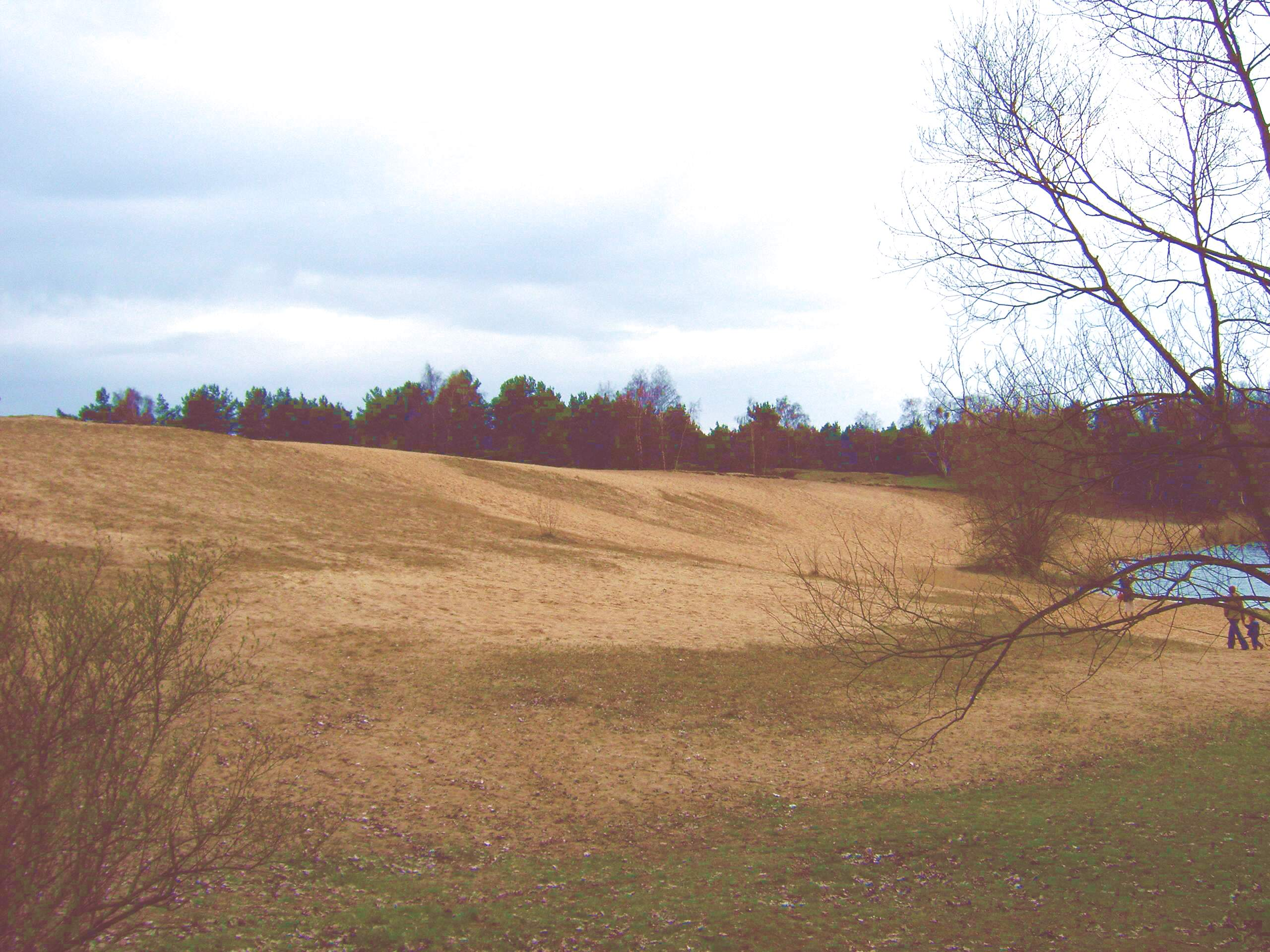 Sanddüne in Gommern, Deutschland Bild aufgenommen am 16.4.2006 Urheber: Olaf Meister